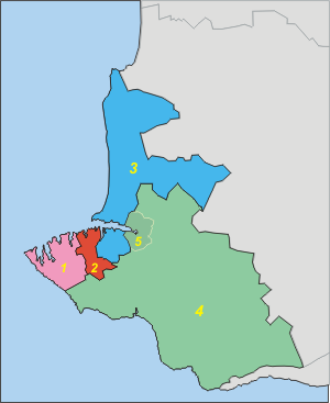 Административная карта-схема Севастополя и его районов